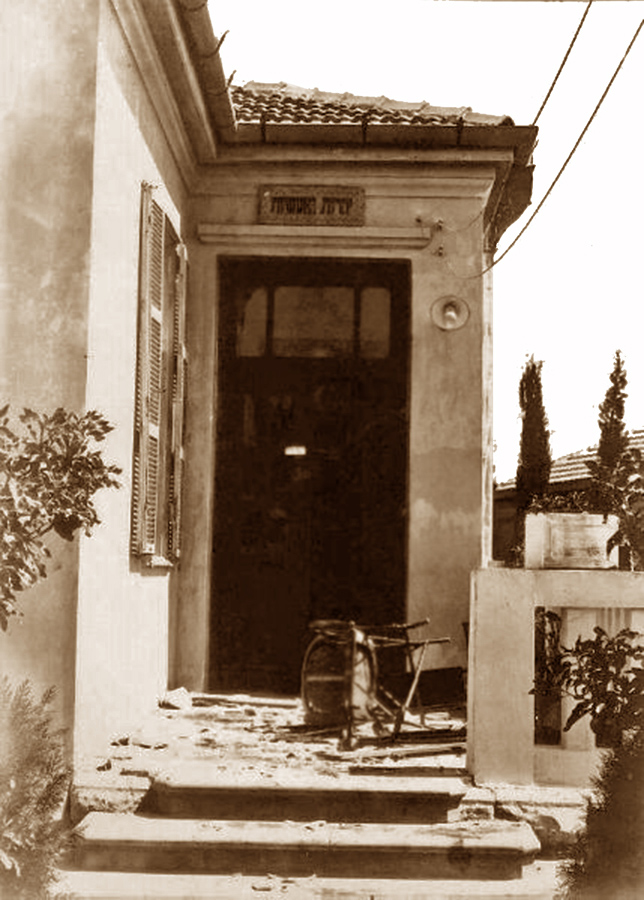 בית he:יוסף קלאוזנר בhe:תלפיות לאחר שנפגע בhe:פרעות תרפ"ט. הכיתוב על הפתח: 'יהדות ואנושיות'